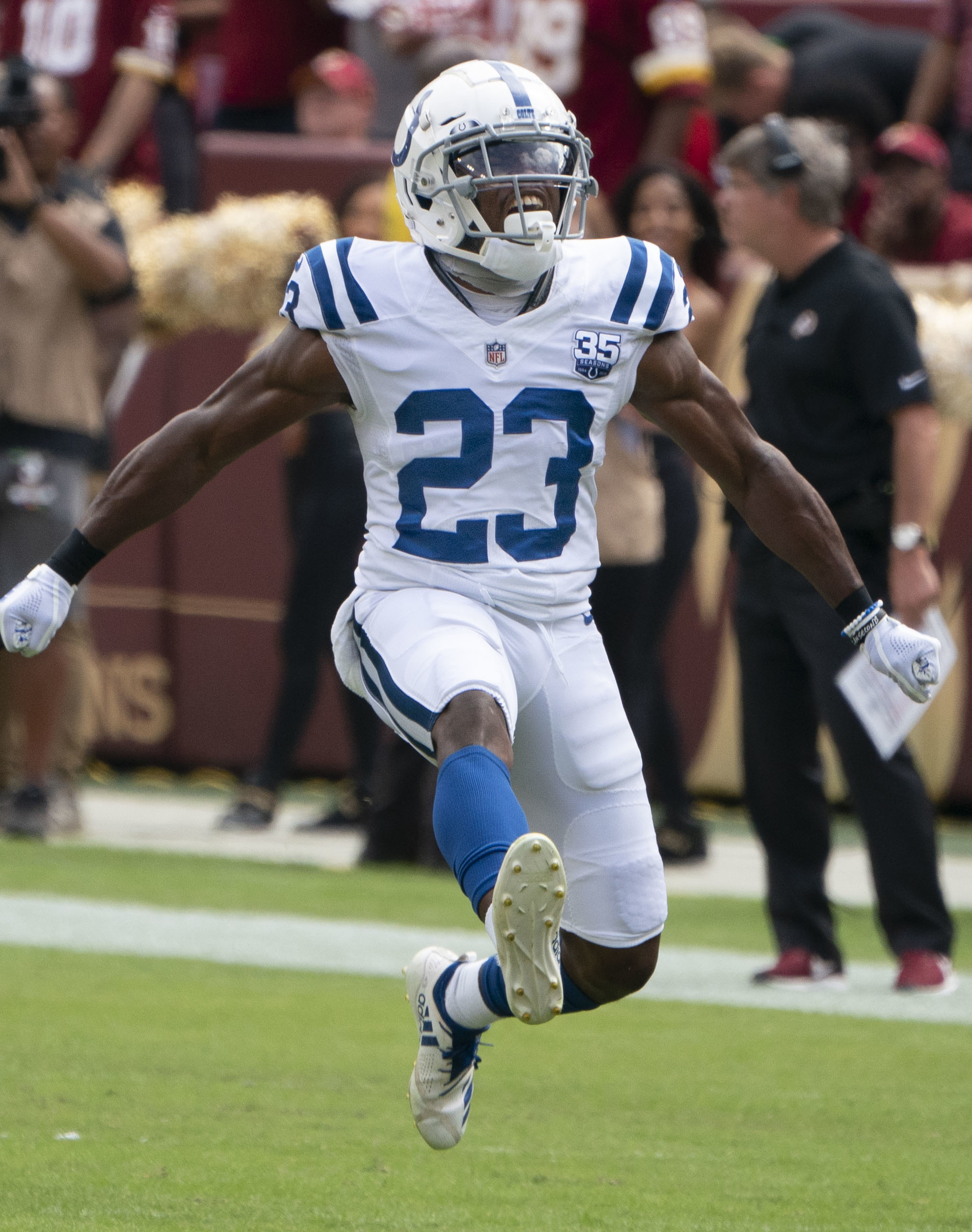 Colts at Redskins 09/16/18